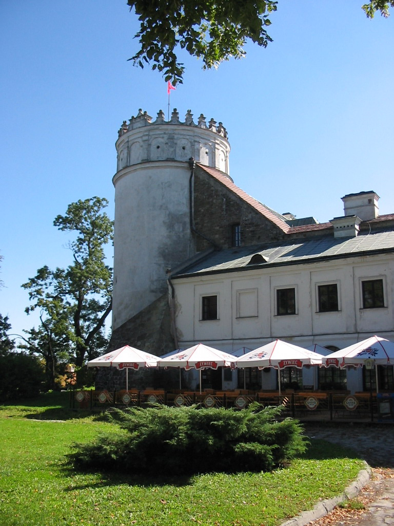 Zamek Kazimierzowski w Przemyślu